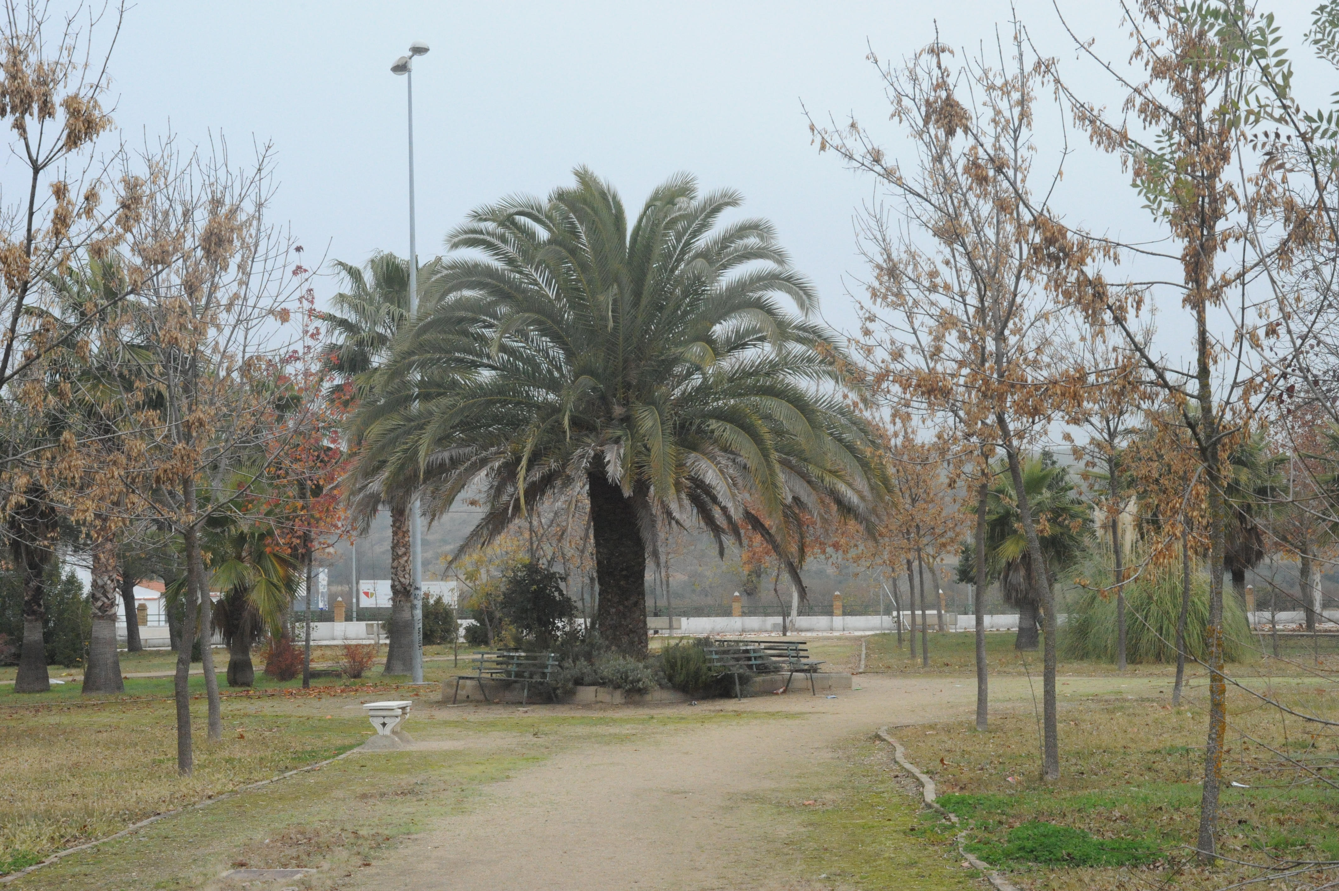 Jardín Botánico de Riolobos, (Cáceres)